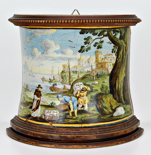 Piccolo albarello svasato con la raffigurazione dello sbarco delle masserizie per la Certosa di San Giacomo a Capri dipinta sullo sfondo. Maestranze castellane (Francesco Antonio Grue?) attive a Napoli. Prima metà del XVIII secolo. ATTENZIONE ! La raffigurazione NON mostra il Porto di Capri ! Non corrisponde alcun detrtaglio ! --DenghiùComm (talk) 08:46, 19 July 2011 (UTC)